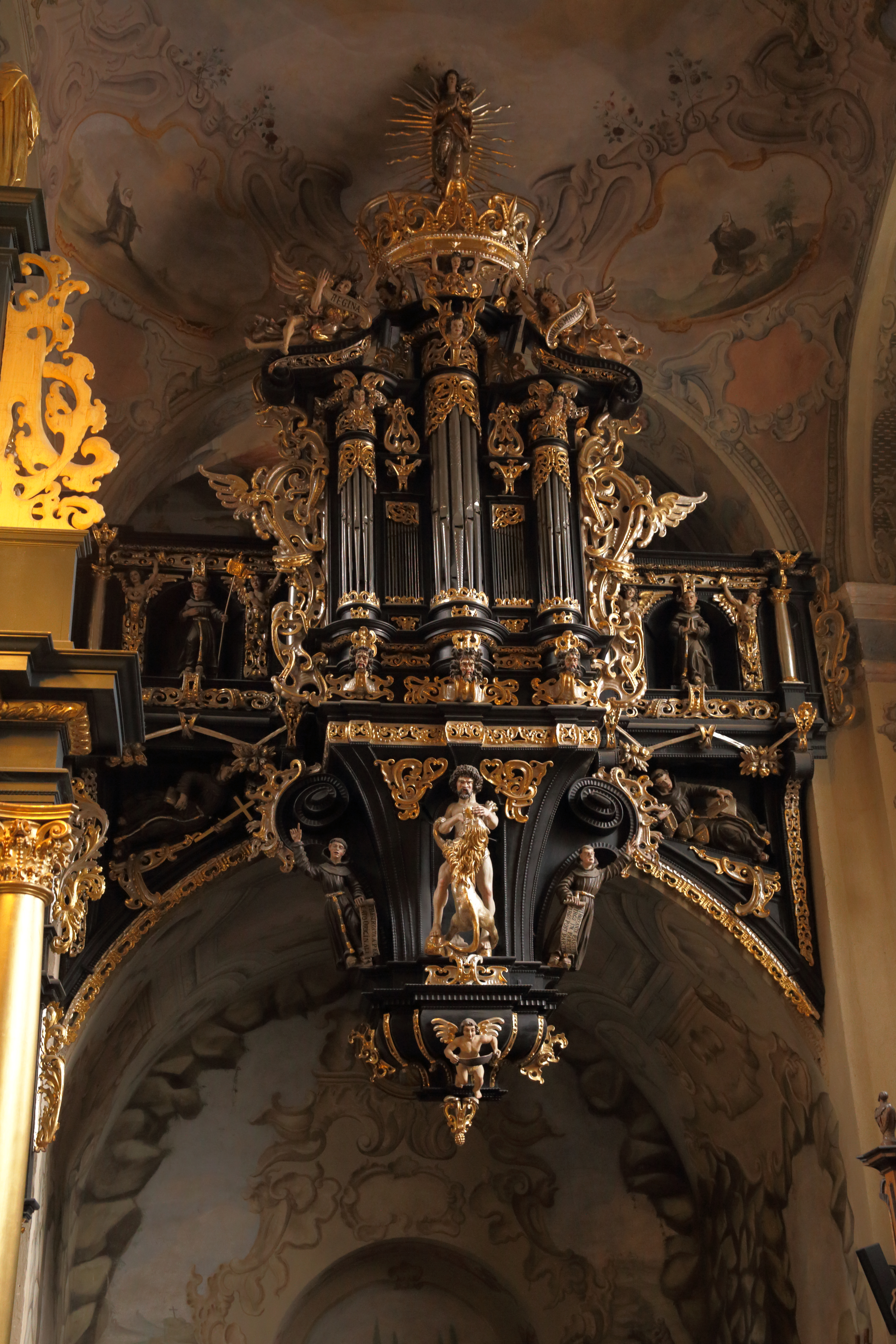 Organy w Leżajsku - organy w nawie północnej.